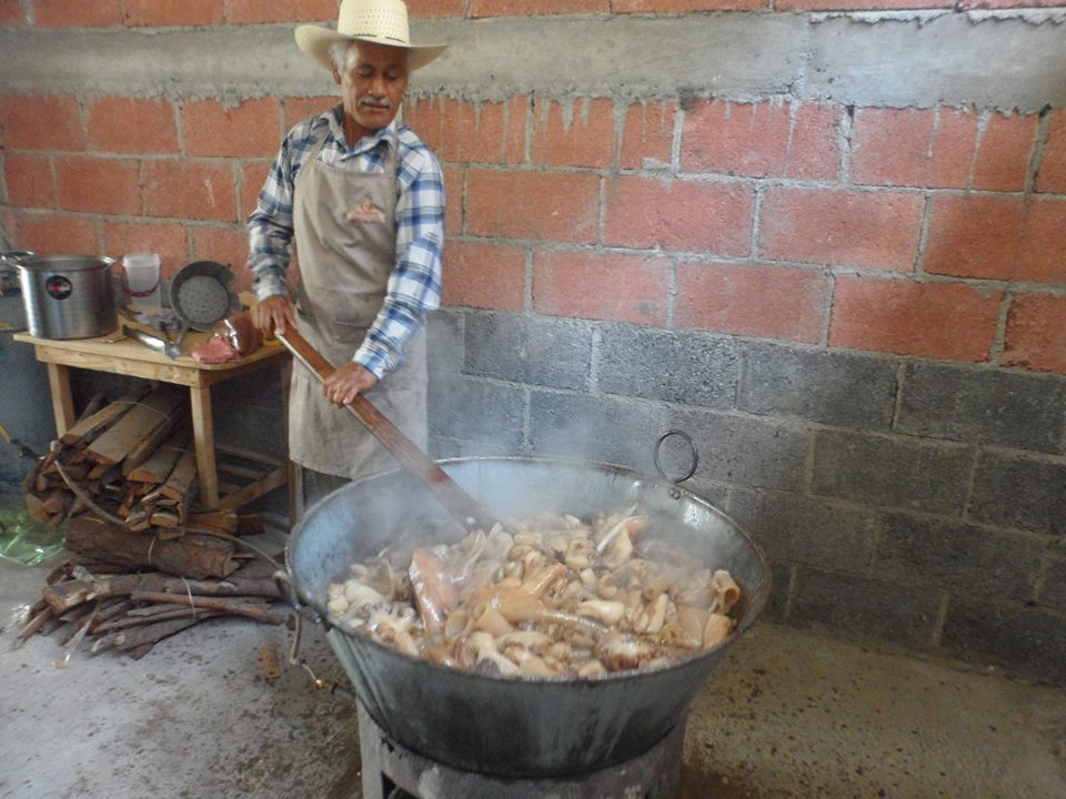 Las carnitas y el chicharrón, así como todos los derivados del cerdo forman parte de la gastronomía típica de Palmarito Tochapán que, junto a un molcajete de salsa, ya sea roja o verde conforman el ritual tan íntimo para disfrutar.